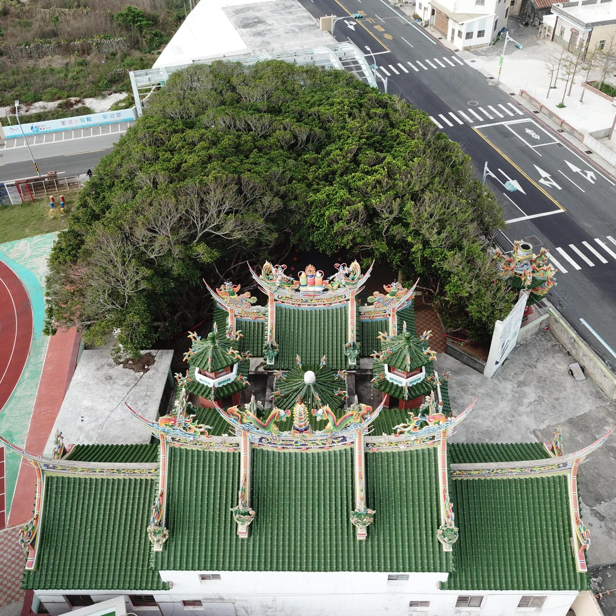 港子保定宮空拍圖